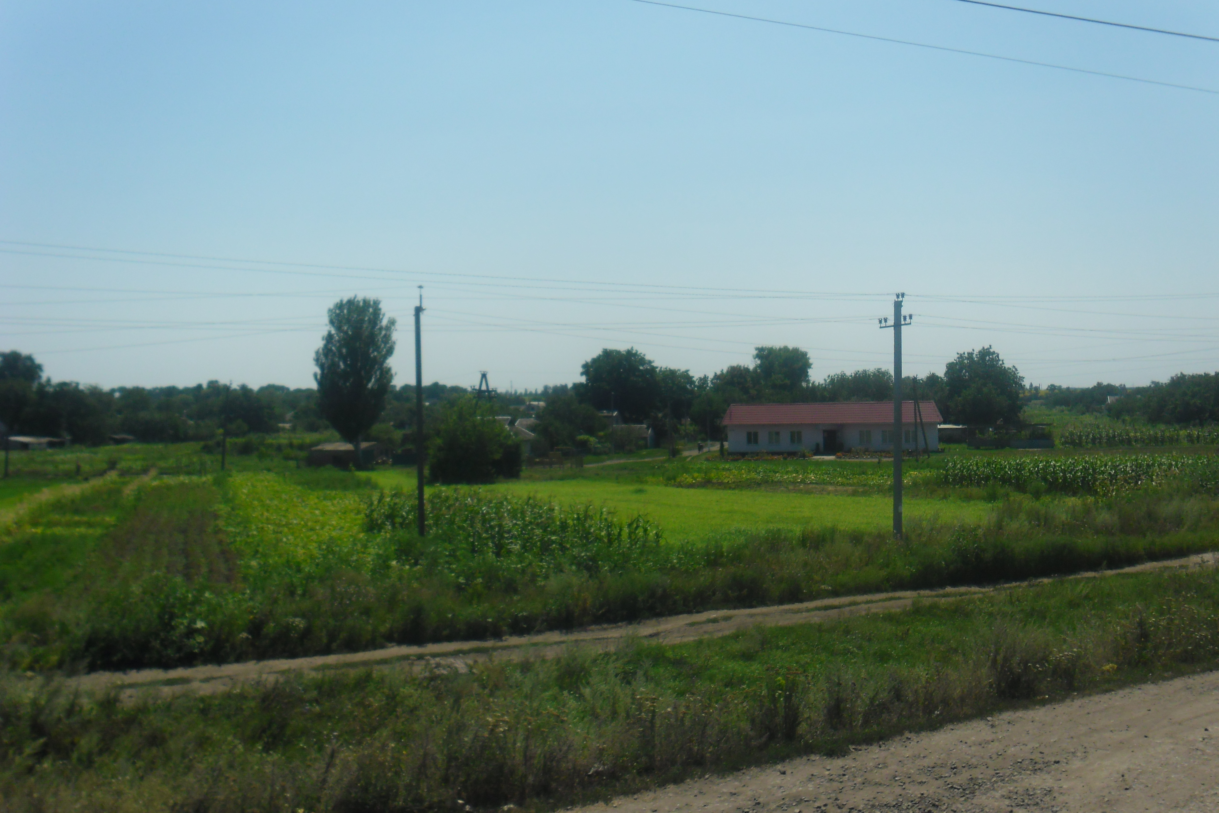 Фото